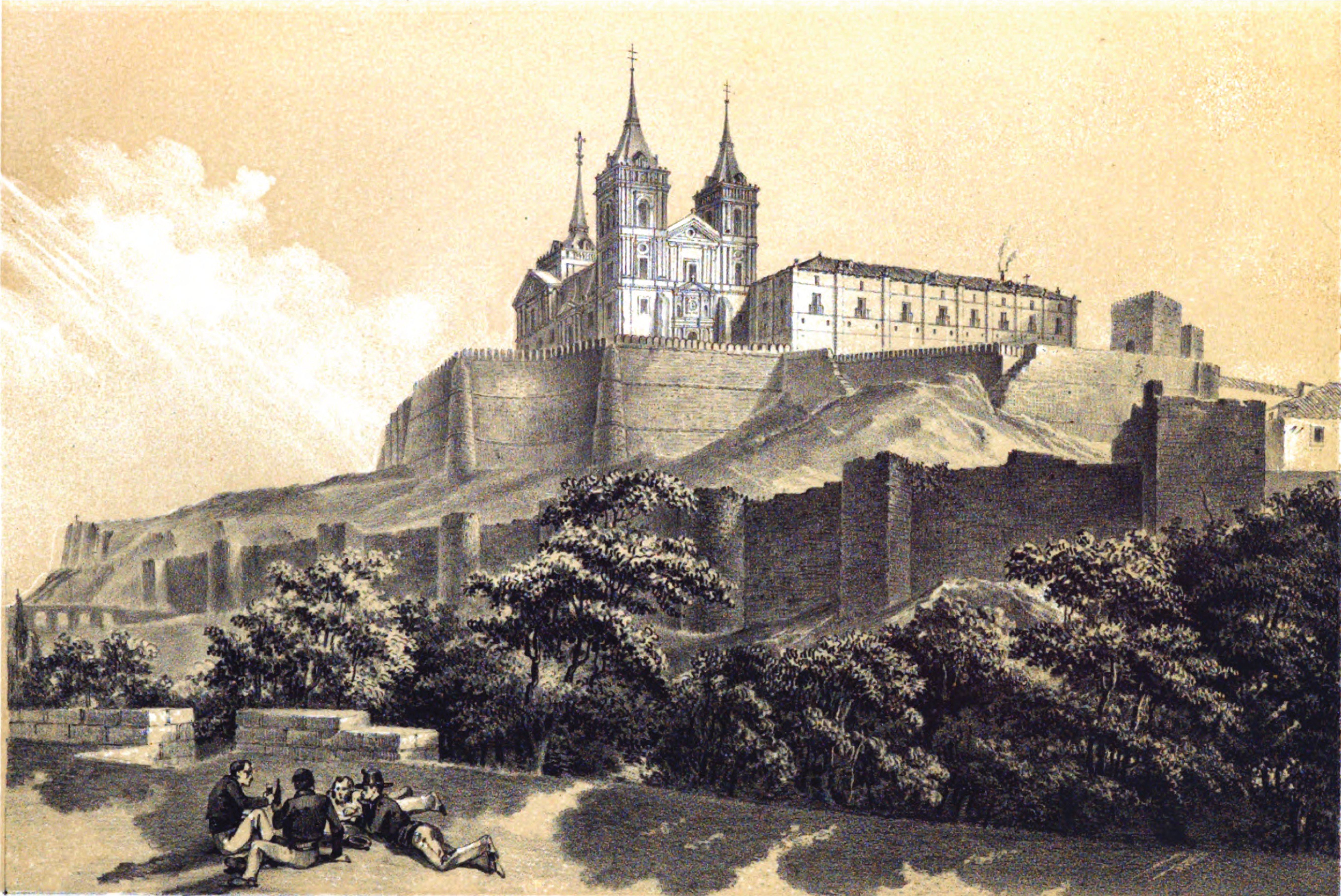 Grabado de Francisco Javier Parcerisa con una vista general del Monasterio de Uclés (provincia de Cuenca - España) que aparece en el libro: Parcerisa FJ. Recuerdos y bellezas de España: Castilla la Nueva (Tomo II). Madrid: Imprenta de D. José Repullés; 1853. p.558.